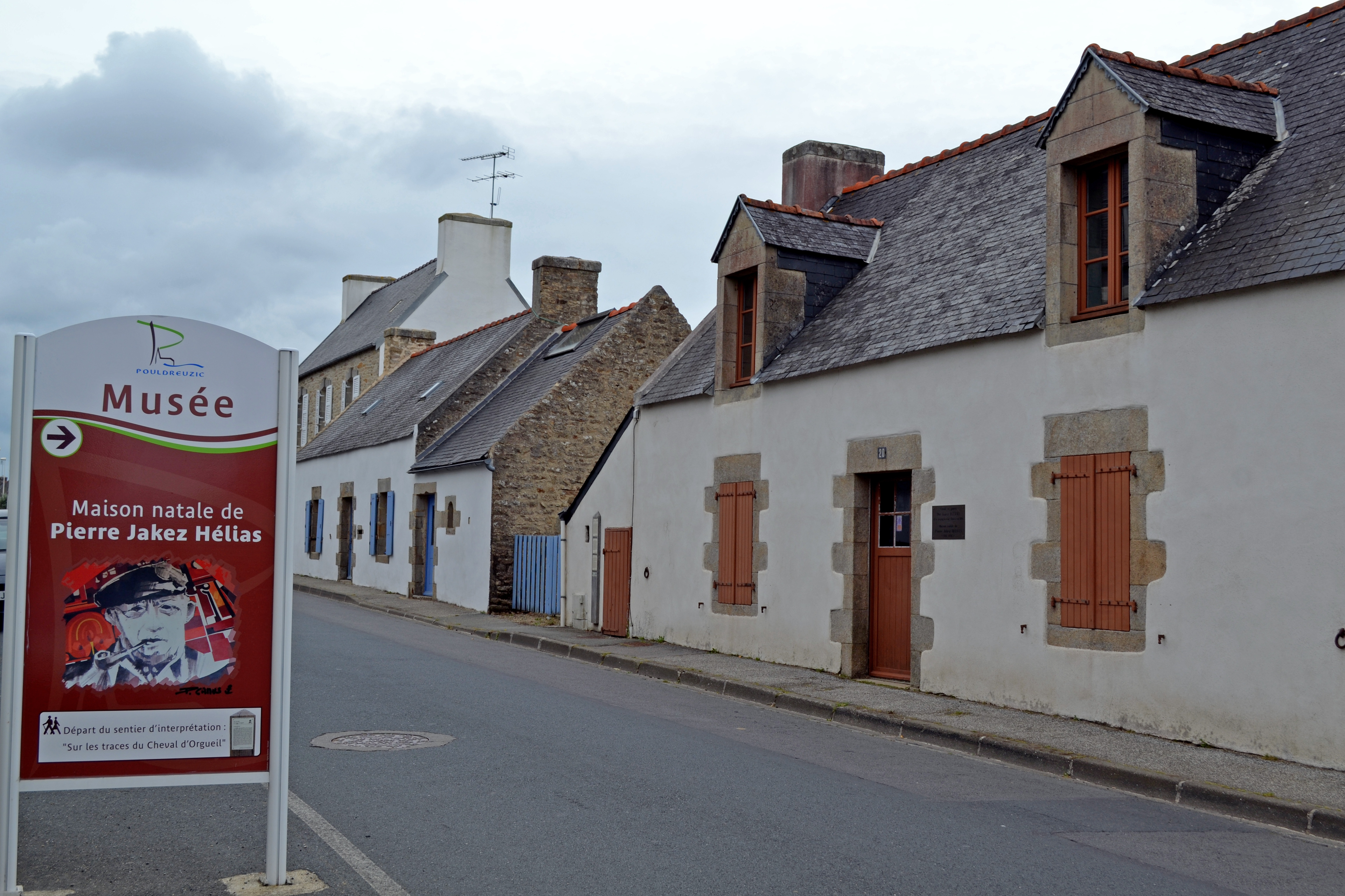 La maison natale de Pierre Jakez Hélias devenue espace muséographique à Pouldreuzic.